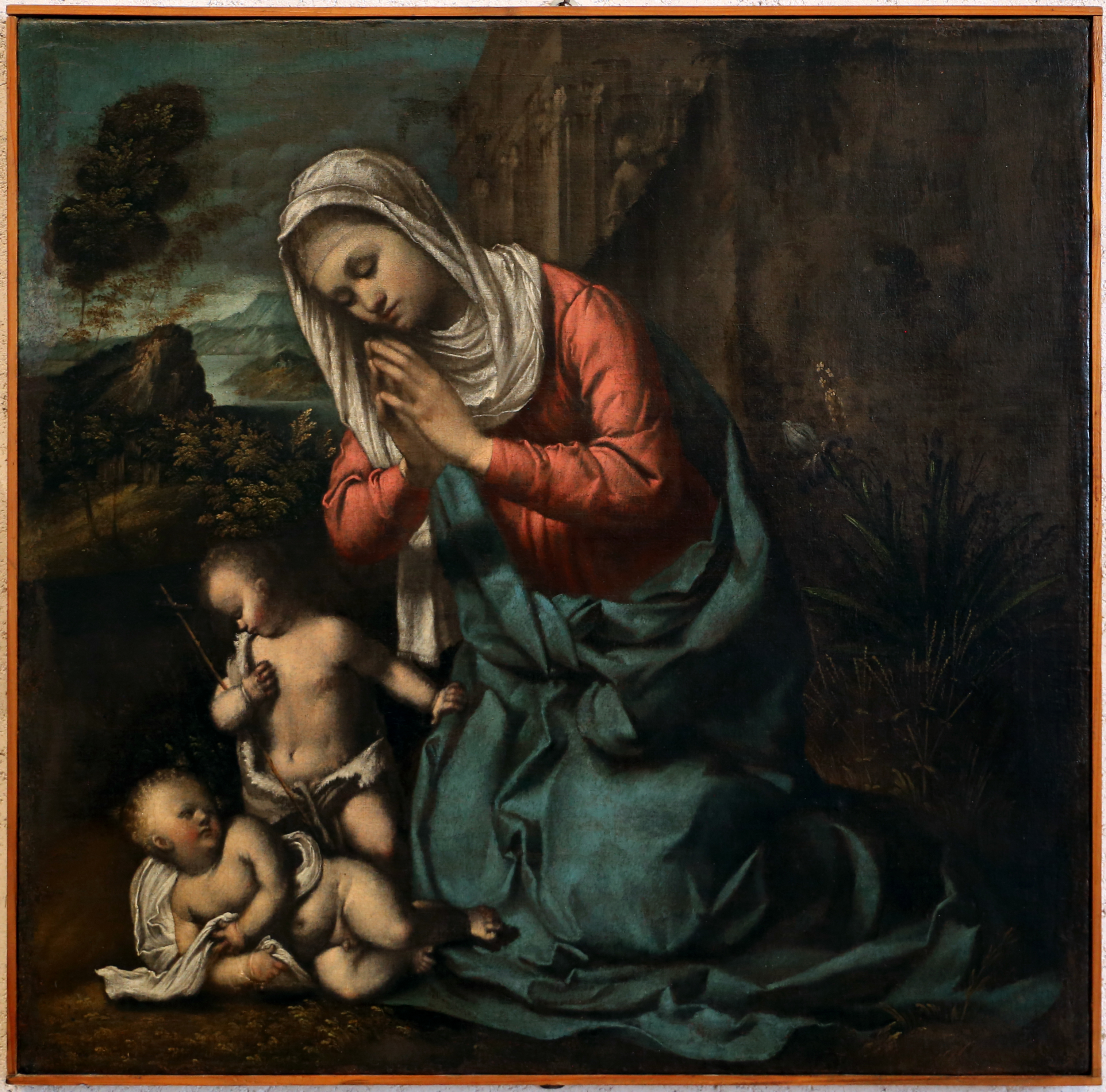 Museo di Castelvecchio This is a photo of a monument which is part of cultural heritage of Italy.